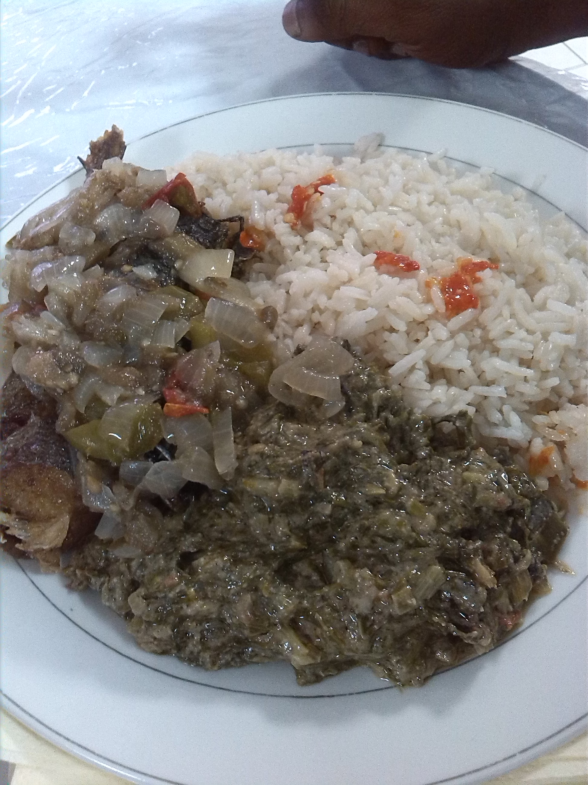 c'est un plat d'un legume que nous appelons point noir dans lequel on a jouté de la pate d'arachide (moambe) avec comma accompagnement le riz et le poisson frit (nous avons choisi le poisson malwa) This is an image of food from Democratic Republic of the Congo